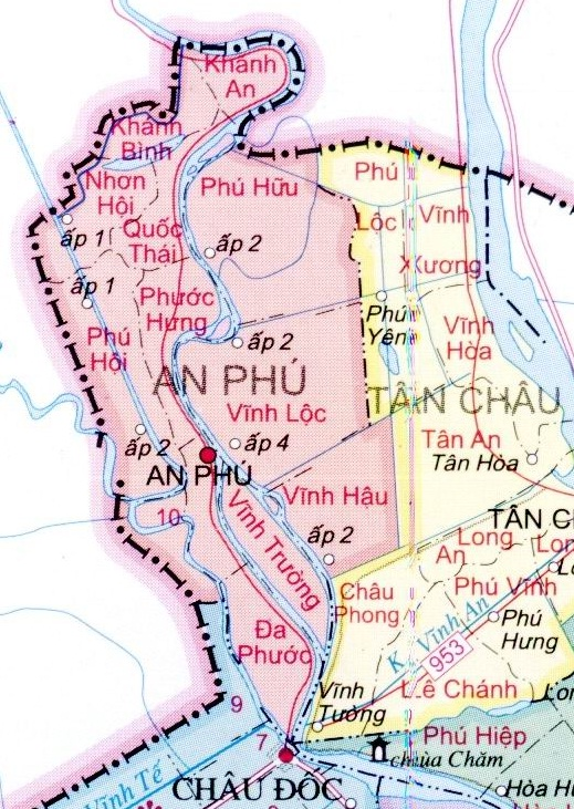 An Phu district map, Ban do huyen An Phu tinh An Giang